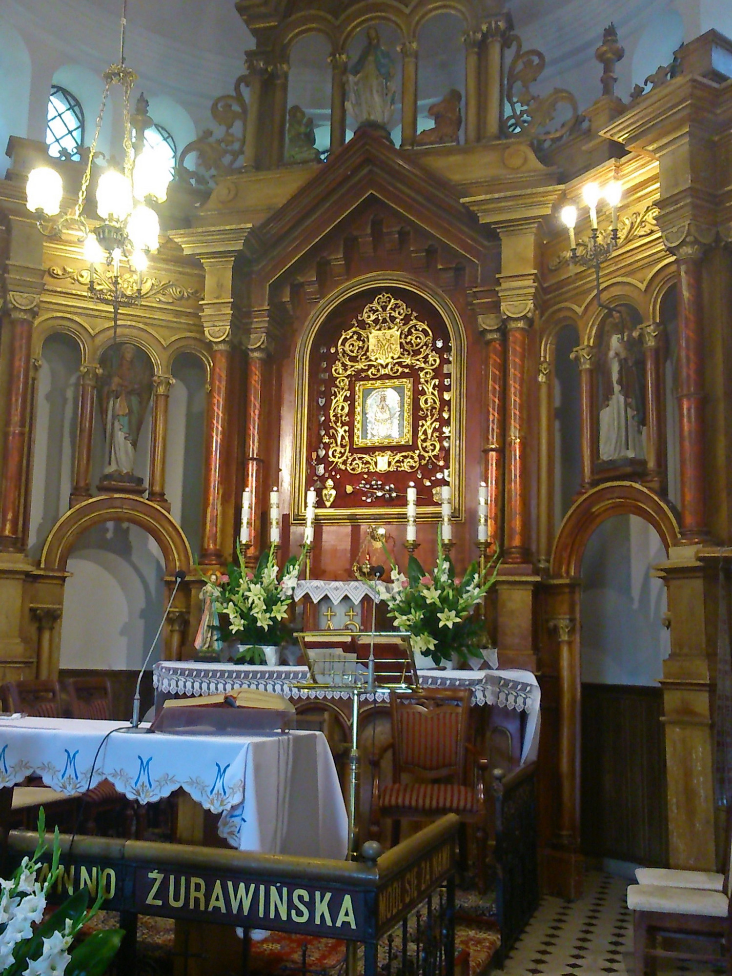 Żurawin - rzymskokatolicki kościół filialny p.w. Przemienienia Pańskiego, 1903, obraz MB Żurawińskiej